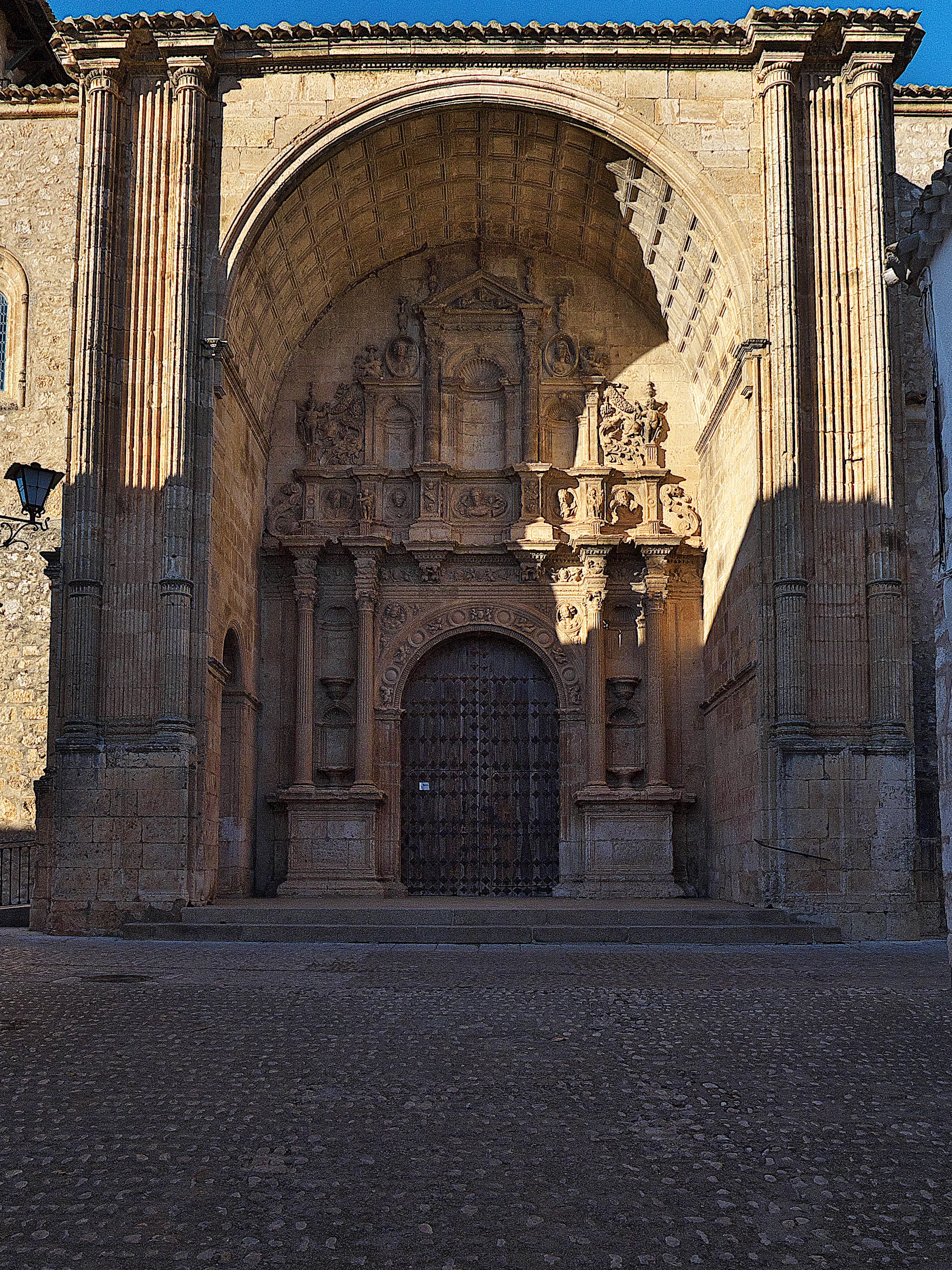 Majestuosa portada de Esteban Jamete (ca. 1550)